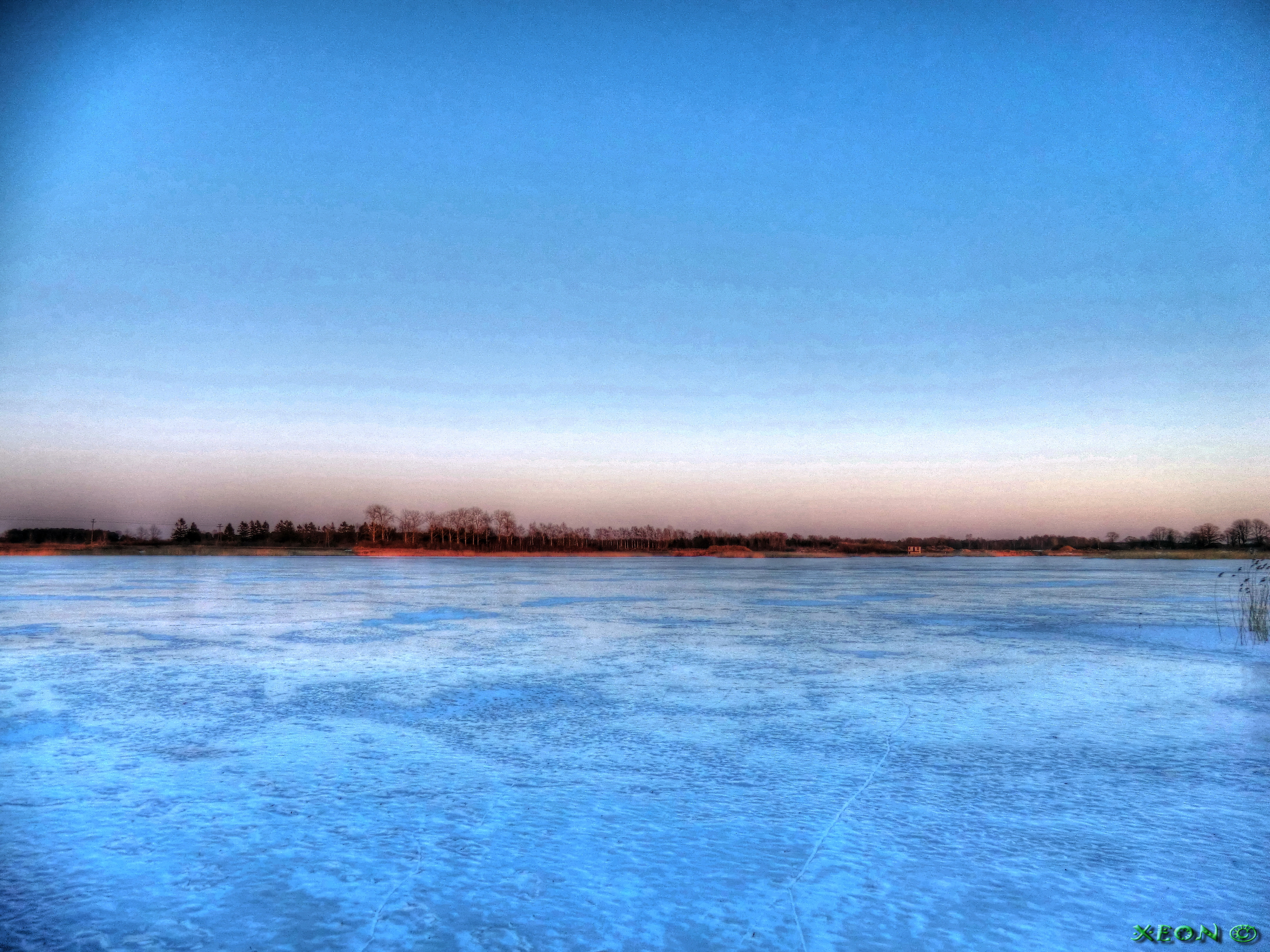 Dubeni Quarry - Winter